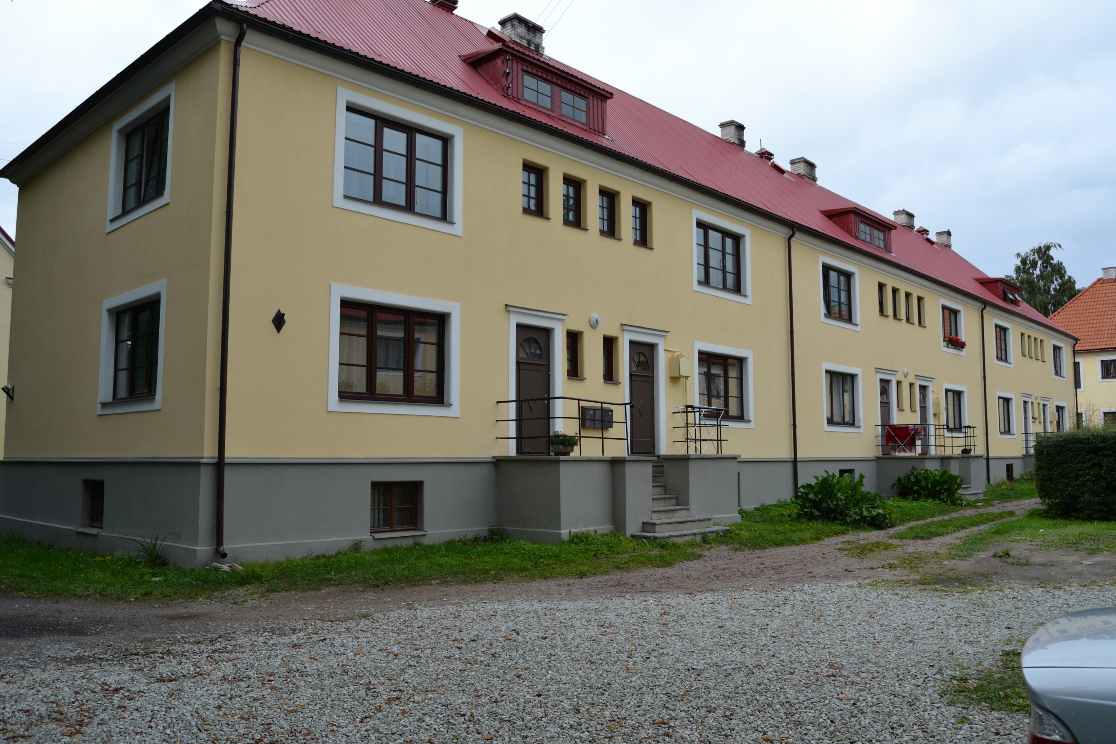 Tallinn, elamu Maisi 6 I, 1929